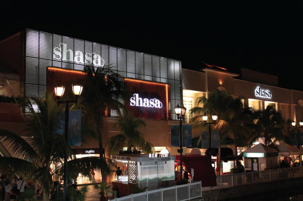 Fachada tienda Shasa Cancún La Isla